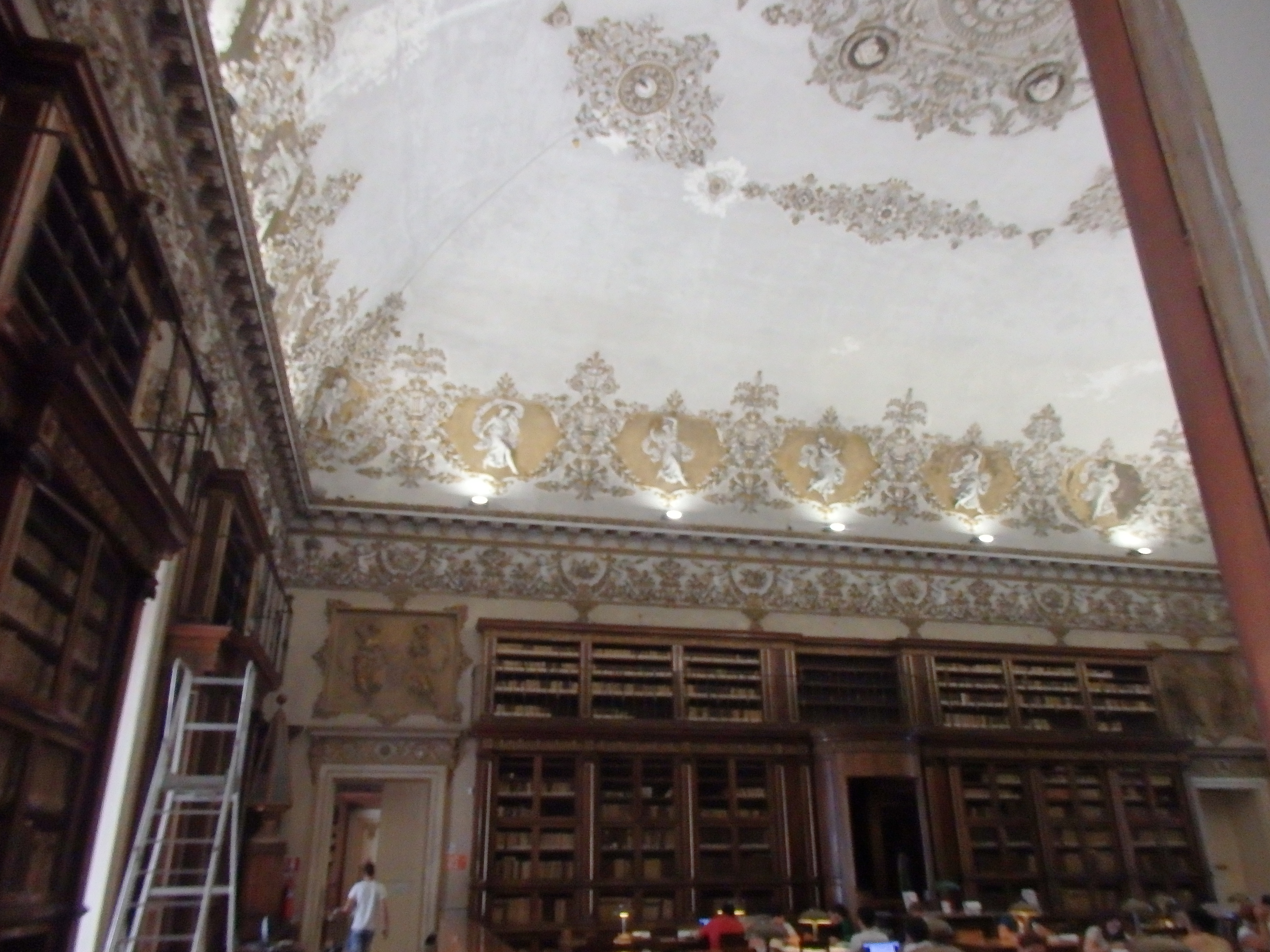 Ingresso e interni della biblioteca nazionale di Napoli.